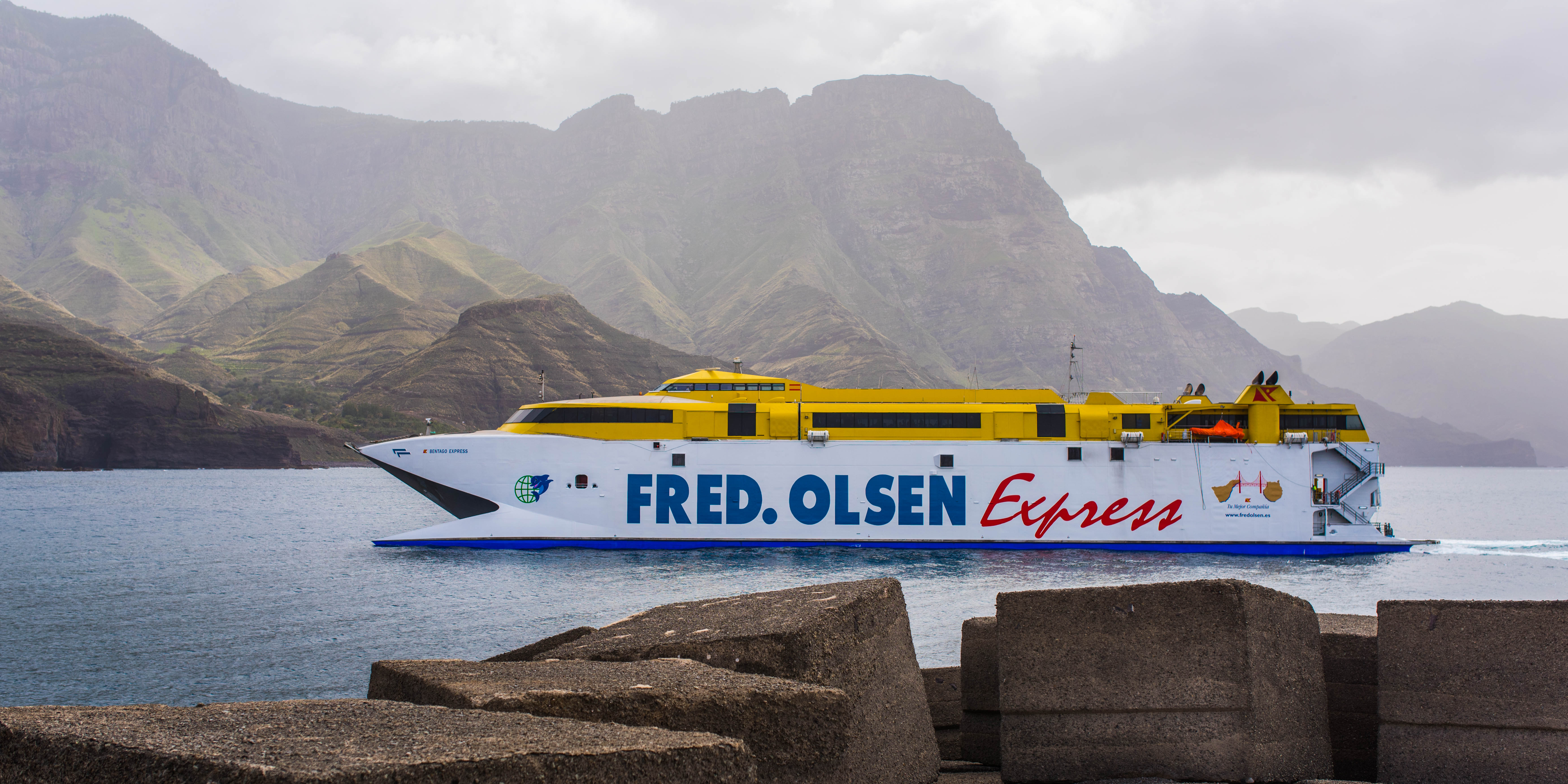 Agaete, Gran Canaria